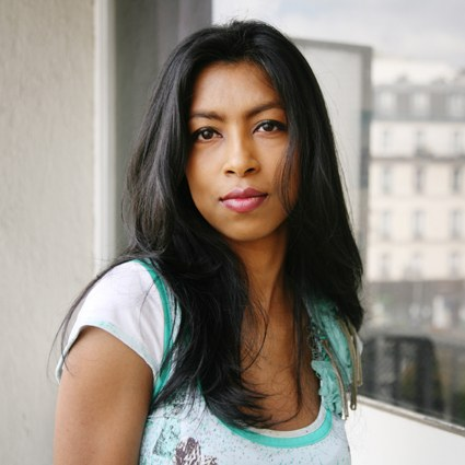 Shumona Sinha, writer